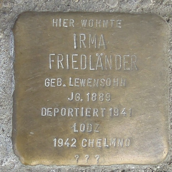 Stolperstein Bergedorf Irma Friedländer geb Lewensohn Sachsentor 38